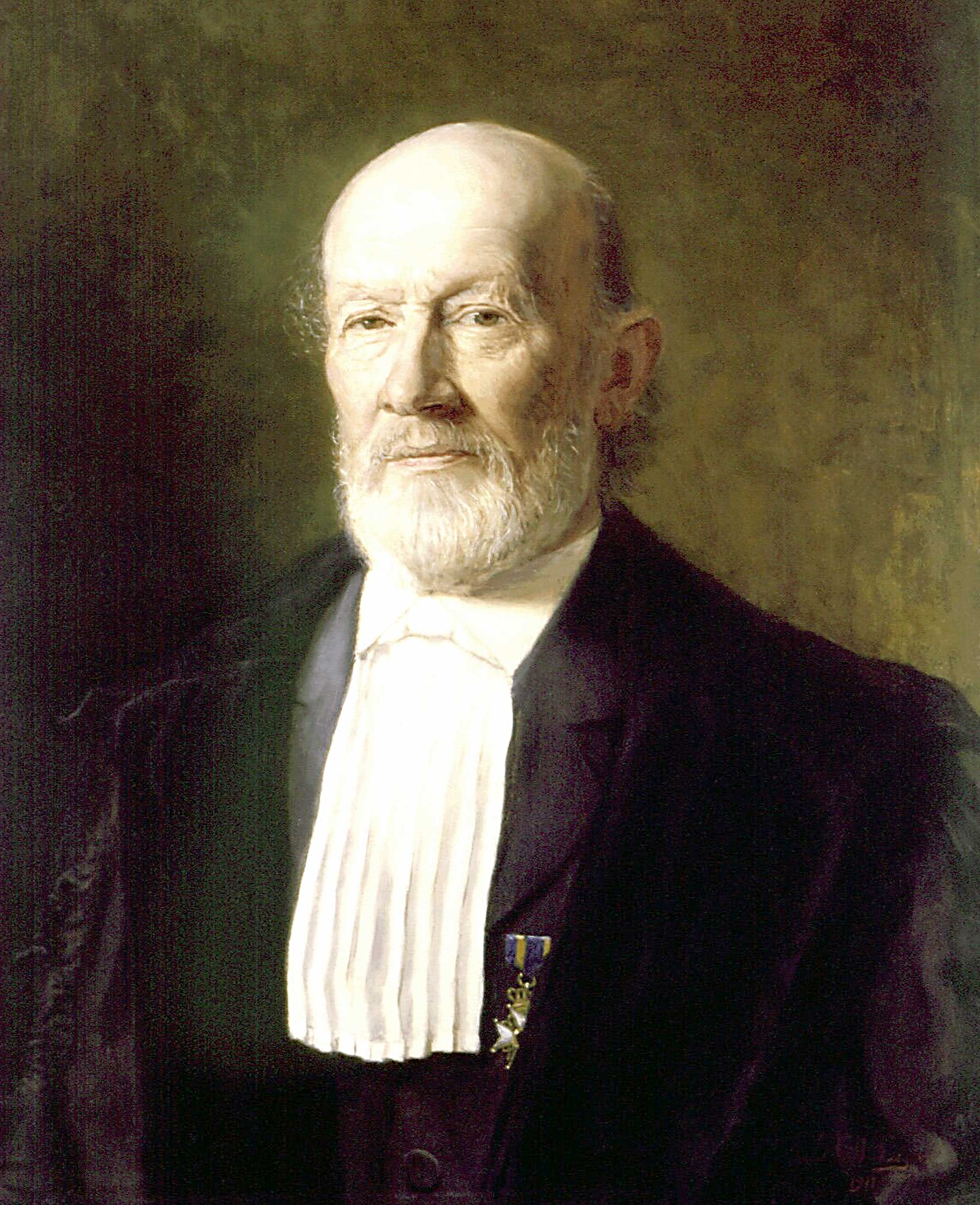 Jan de Louter (1847-1932) niederländischer Rechtswissenschaftler